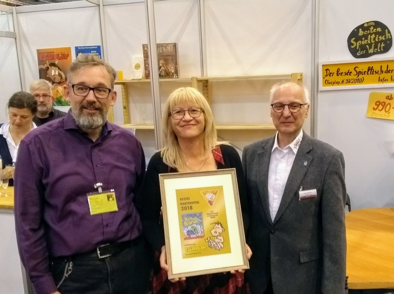 Katja Stremmel erhält die "á la carte"-Spieleauszeichnung zum besten Kartenspiel 2018.